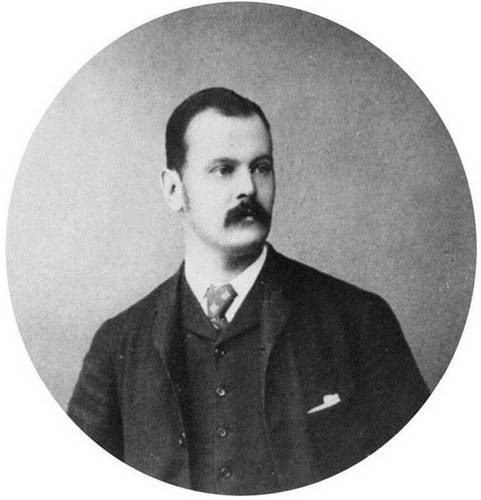 Князь Павел Павлович Голицын (18 мая 1856, Санкт-Петербург — 13 апреля 1914, Санкт-Петербург) — новгородский уездный и губернский предводитель дворянства, член Государственного совета.